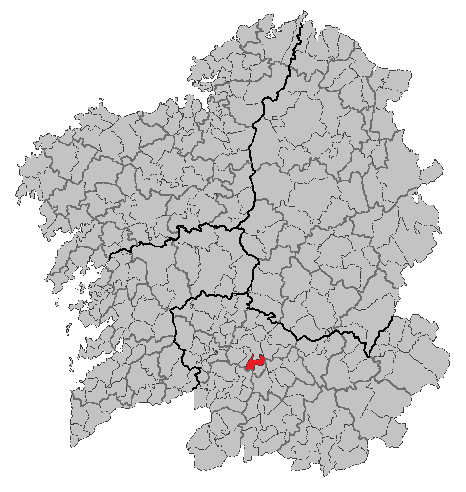 Mapa coa localización do concello de San Cibrao das Viñas.